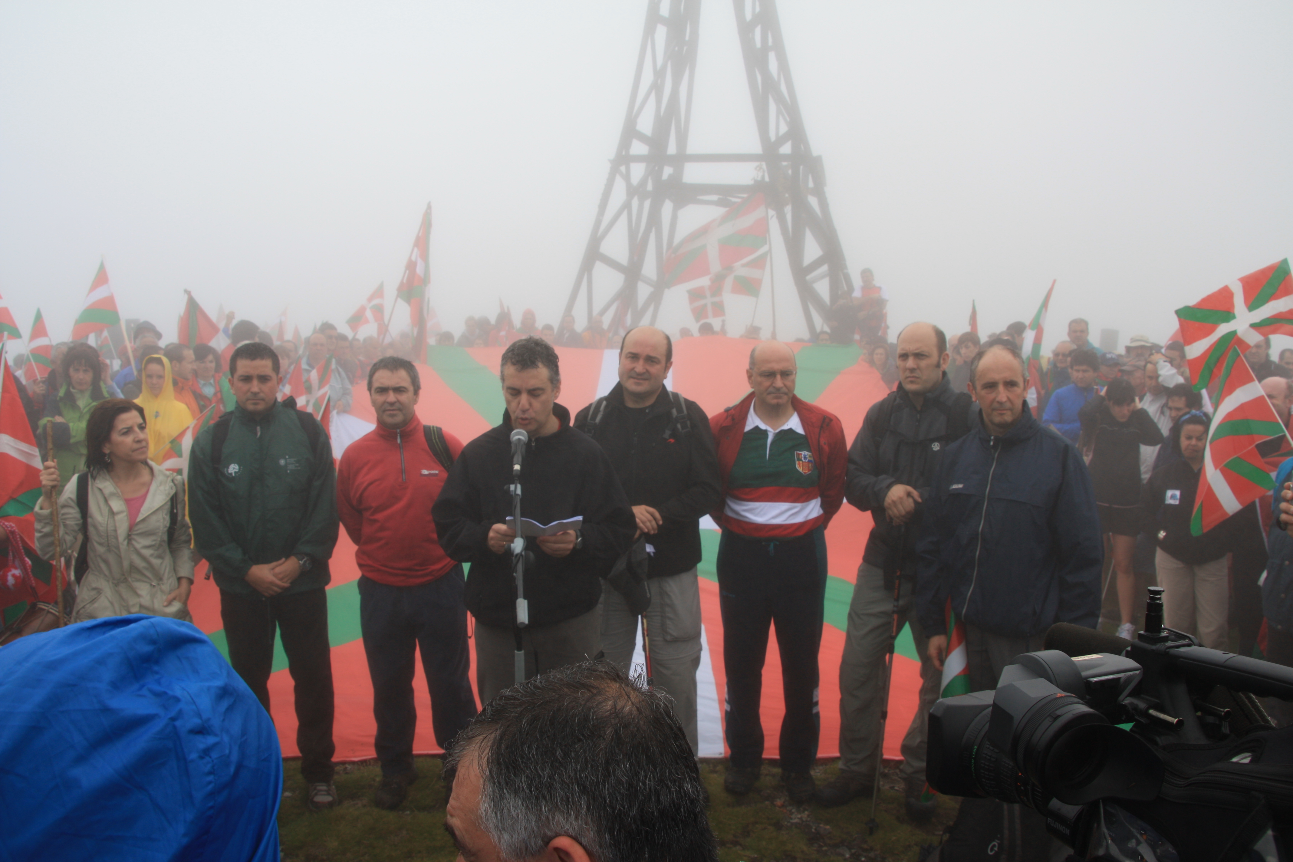 El PNV convocó una marcha montañera a la cruz del Gorbea el 4 de julio de 2009 a la que animó a llevar ikurriñas. Respondía de esta forma a la colocación de dos banderas españolas en unas maniobras militares pocos días antes.